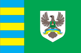 Прапор Тячівського району